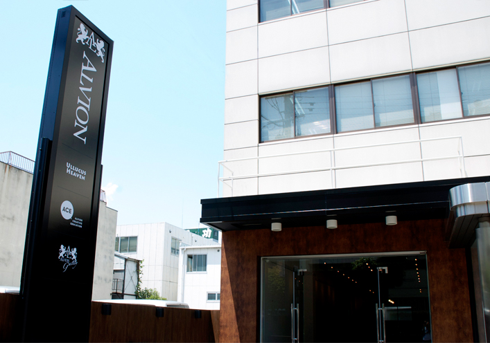 株式会社アルヴィオンの外観